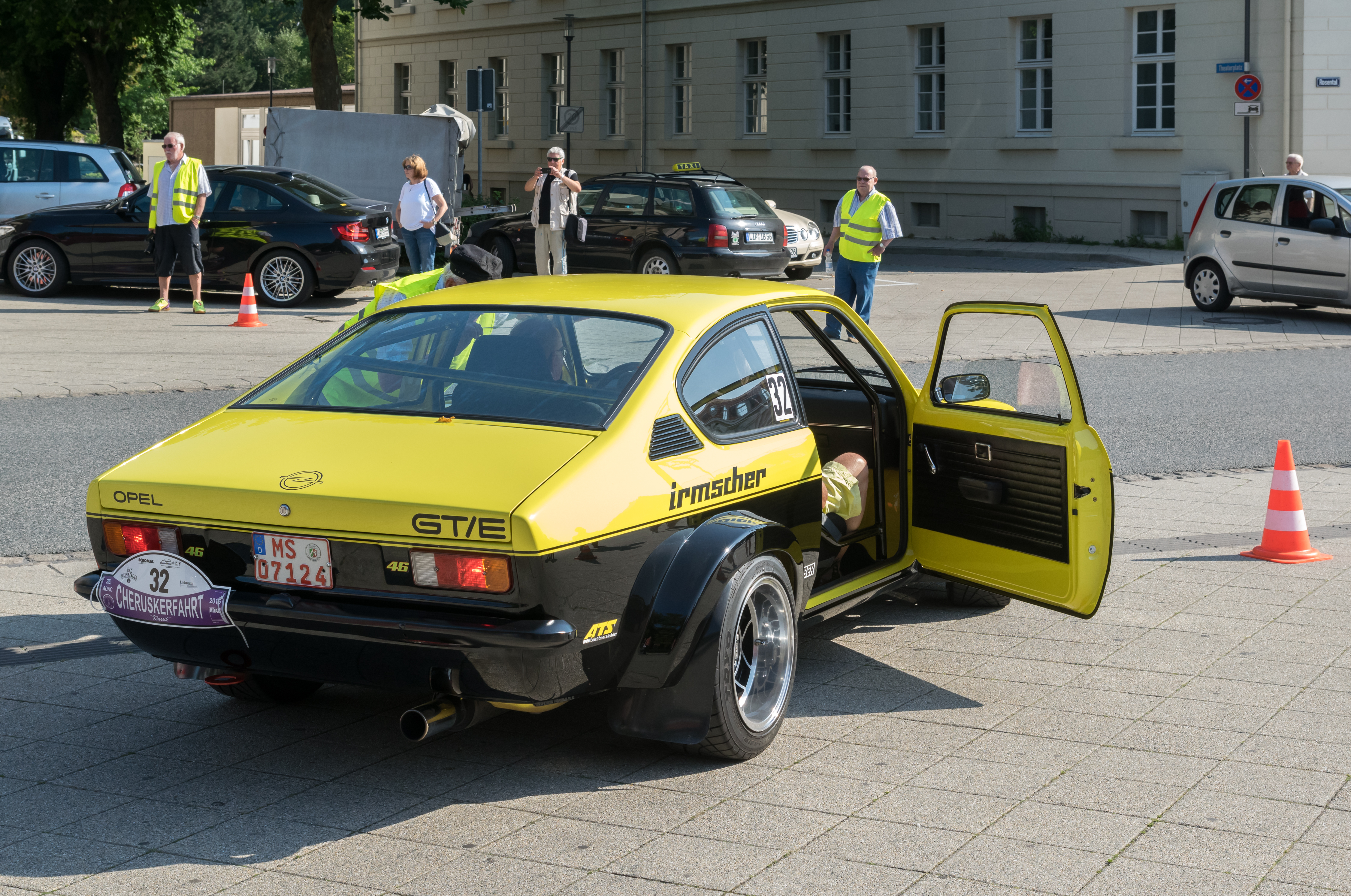 Opel Kadett GT/E, Baujahr 1976, bei der Cheruskerfahrt 2016, Startpunkt am Theater in Detmold